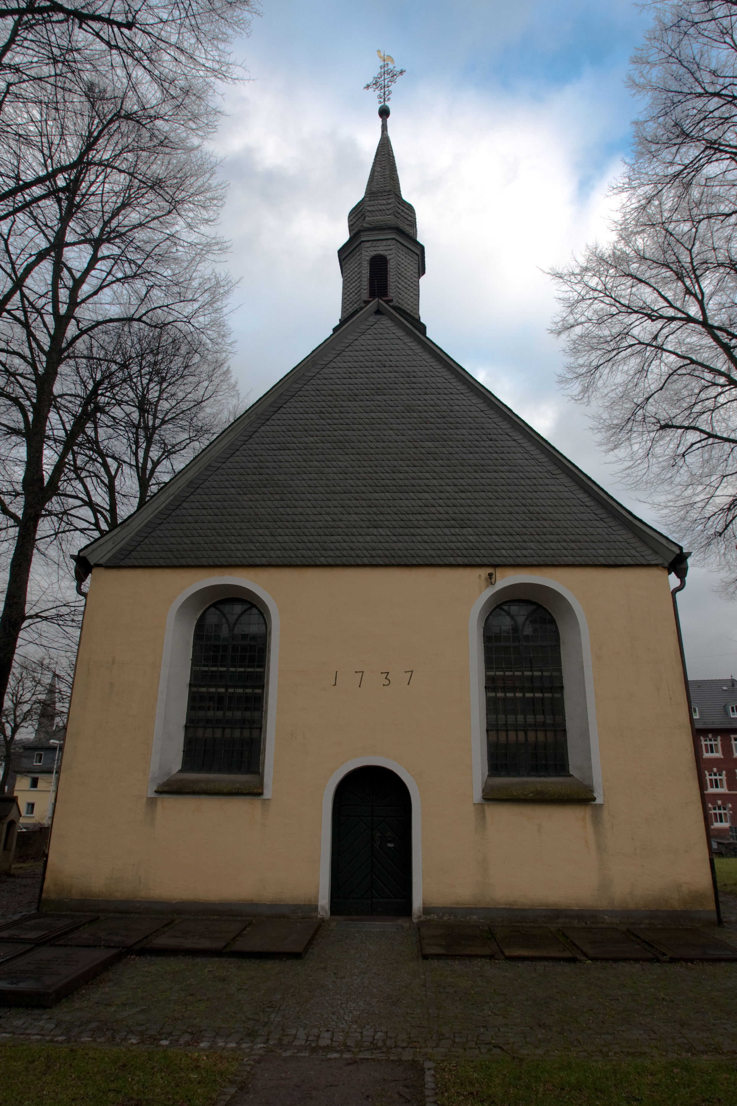 Frontansicht der katholischen Kreuzkapelle in Olpe.